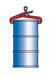 Outils : Pince de levage Hydraulique